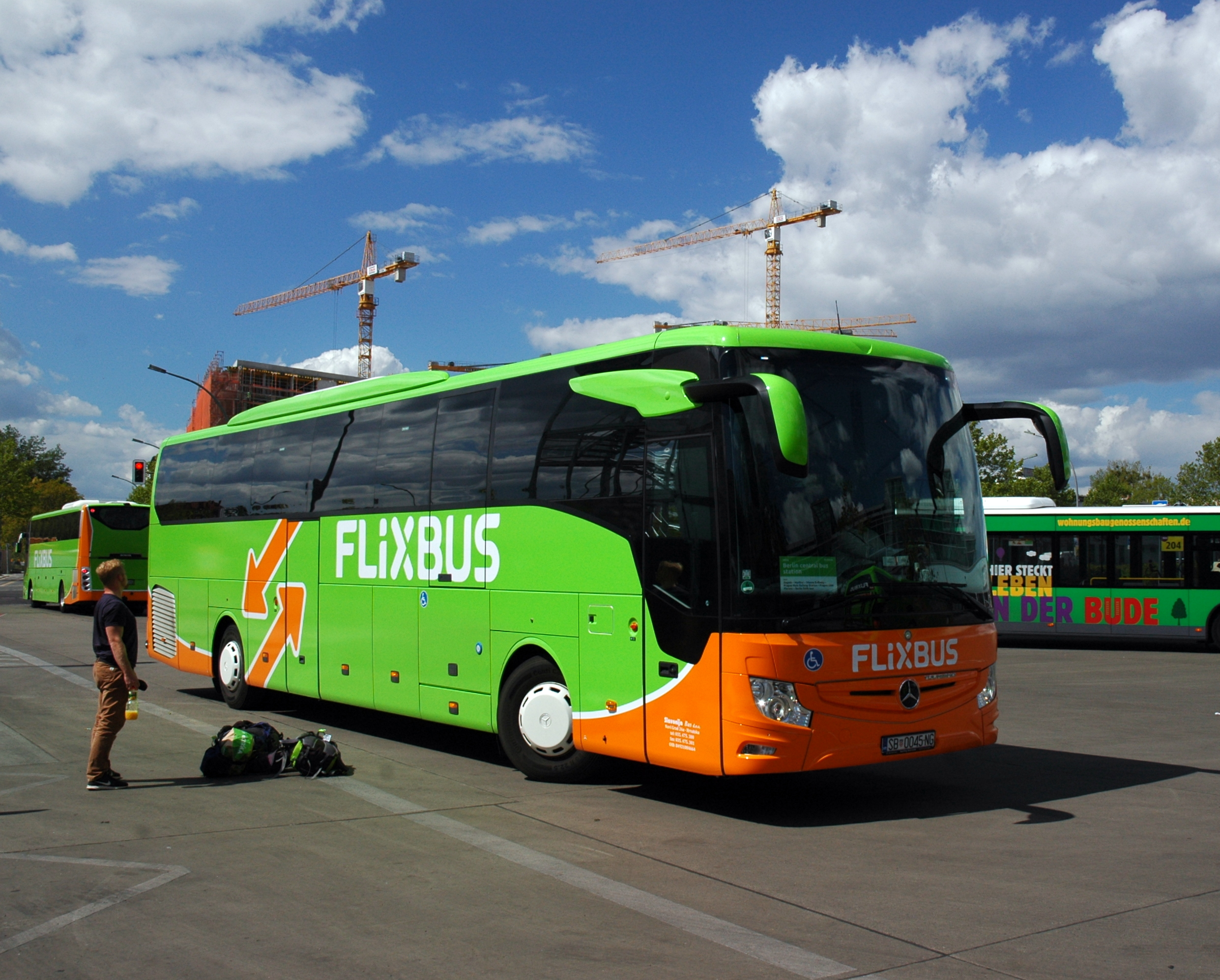 Berlin - Hildegard-Knef-Platz - Mercedes-Benz Tourismo III - FLIXBUS